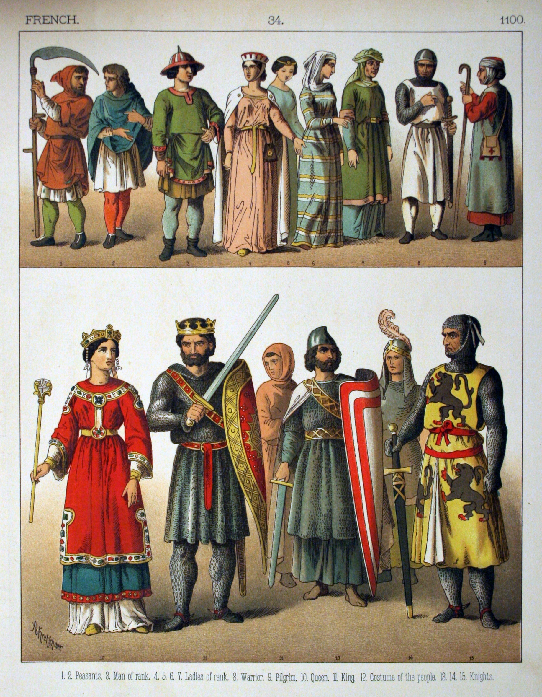 1100, French